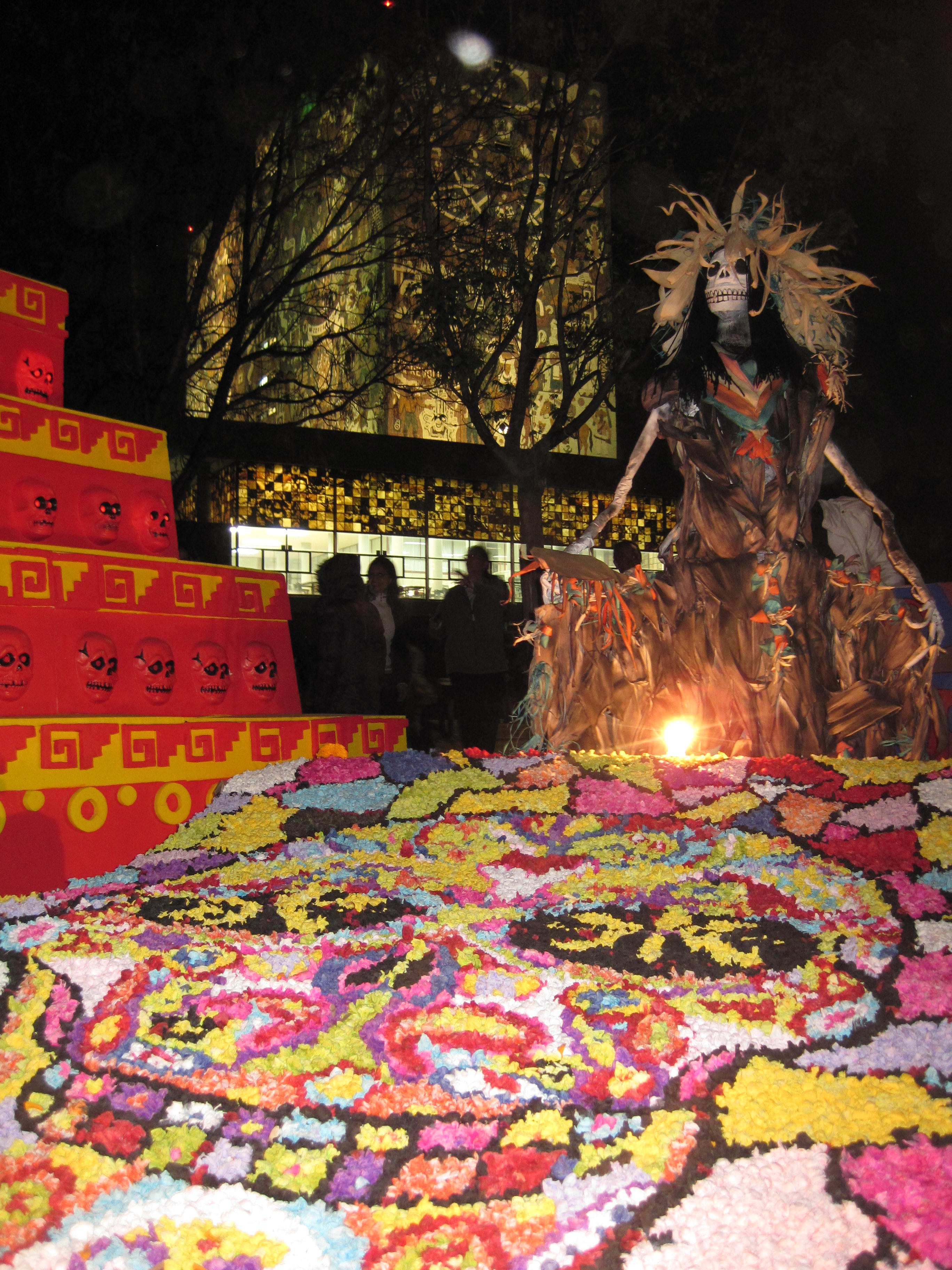 Ofrenda colocada en la Universidad Nacional Autónoma de México, en la cual podemos observar a la muerte representada y honrada en forma de mujer así como representada en un tapete de bolitas de papel y altos relieves en la píramide color rojo.